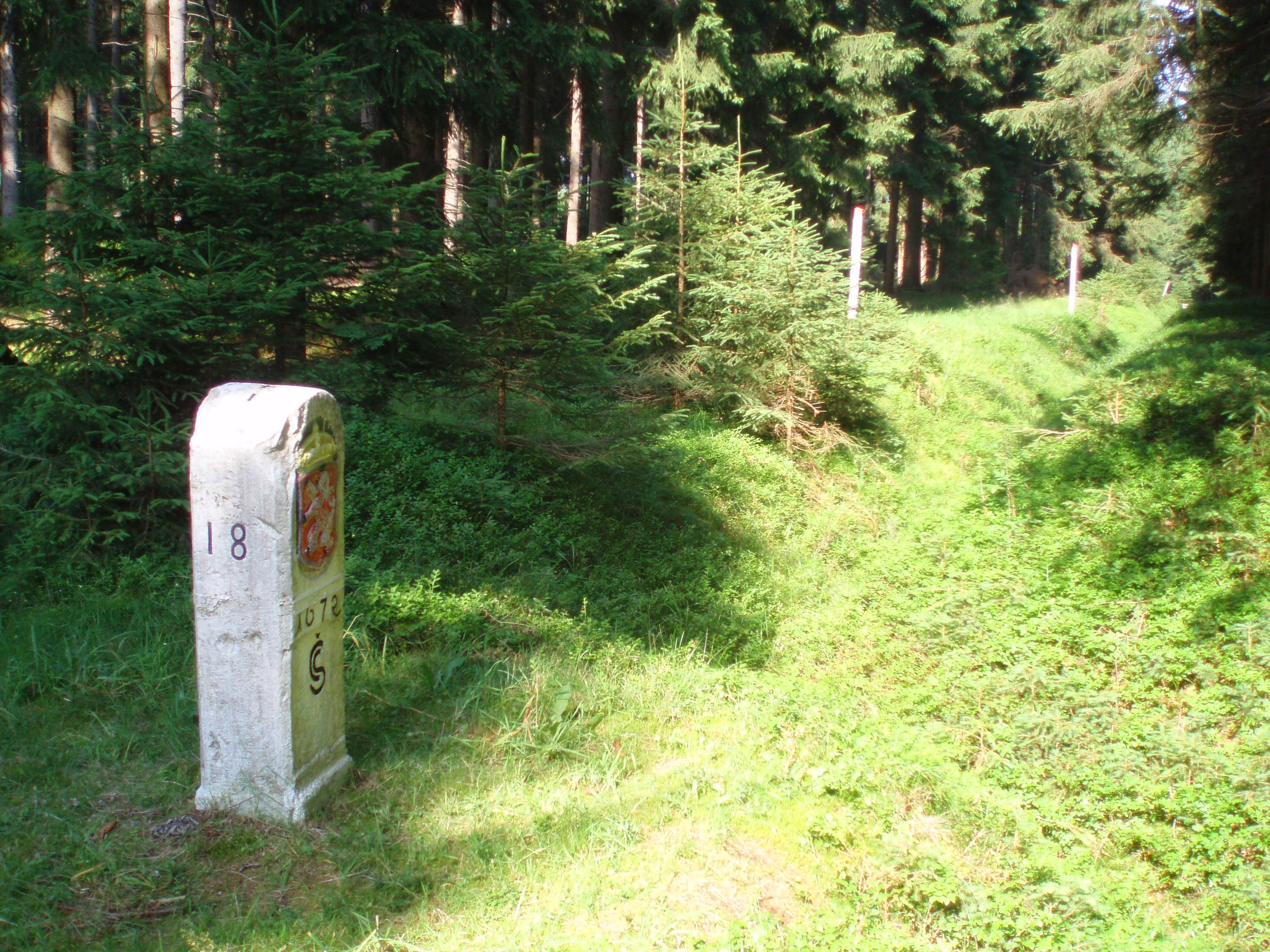 An dr Grenz vu Sachsn